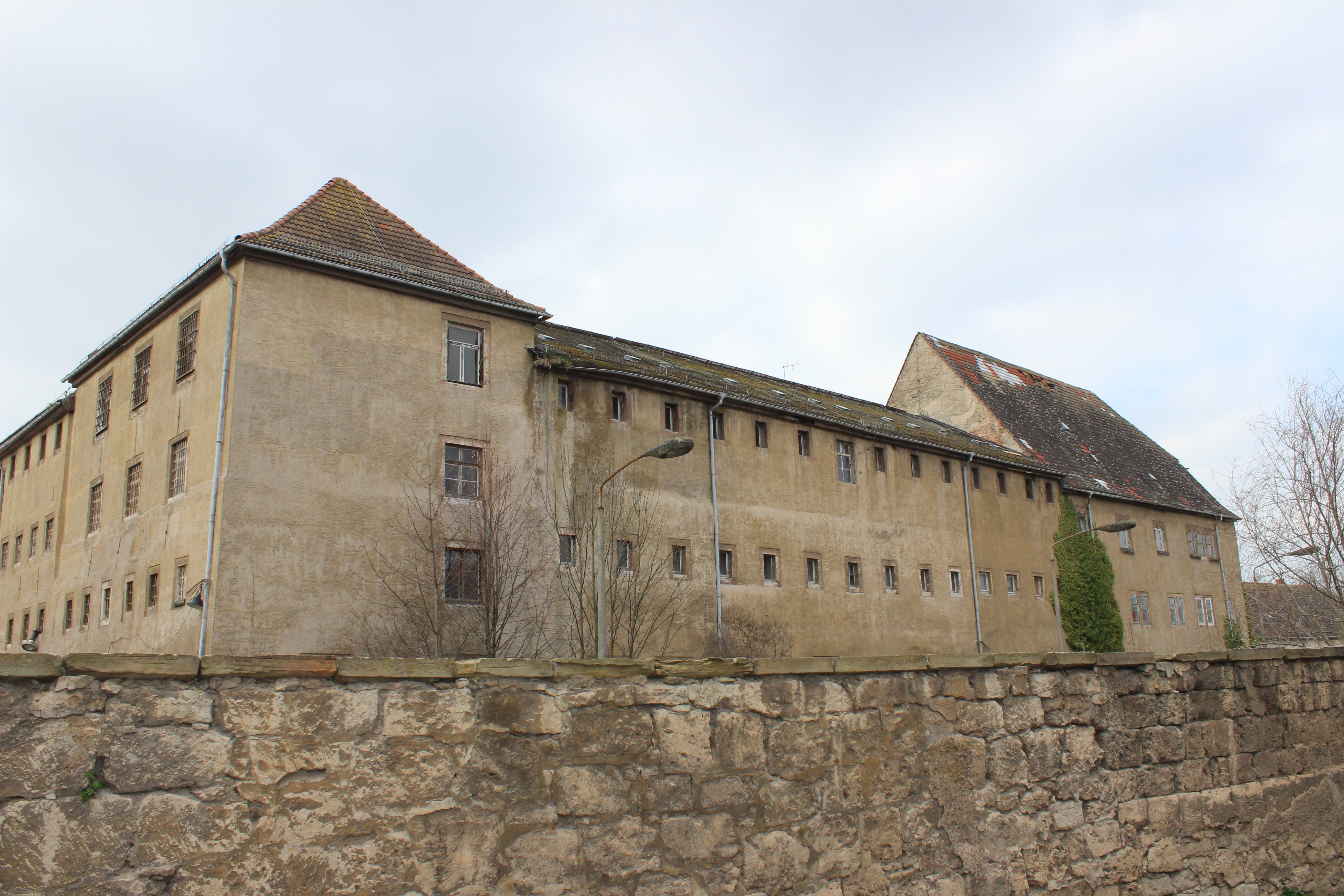 Schloss Tonna in Gräfentonna (auch "Kettenburg" genannt)